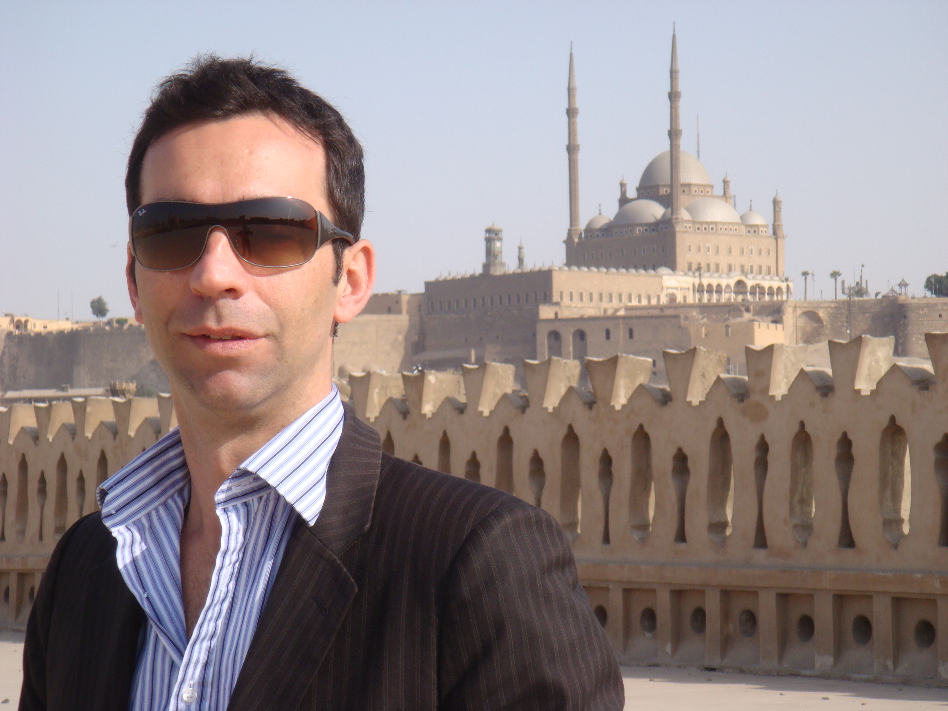 foto de César Tralli no Cairo, Egito.